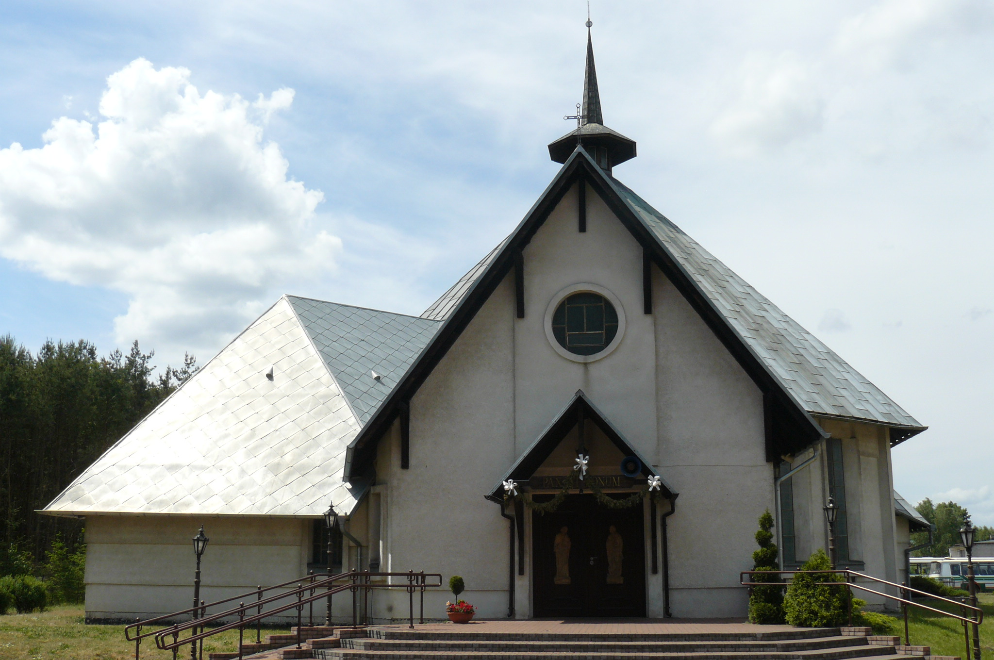 Kościół Opatrzności Bożej w Drawskim Młynie wraz z otoczeniem.